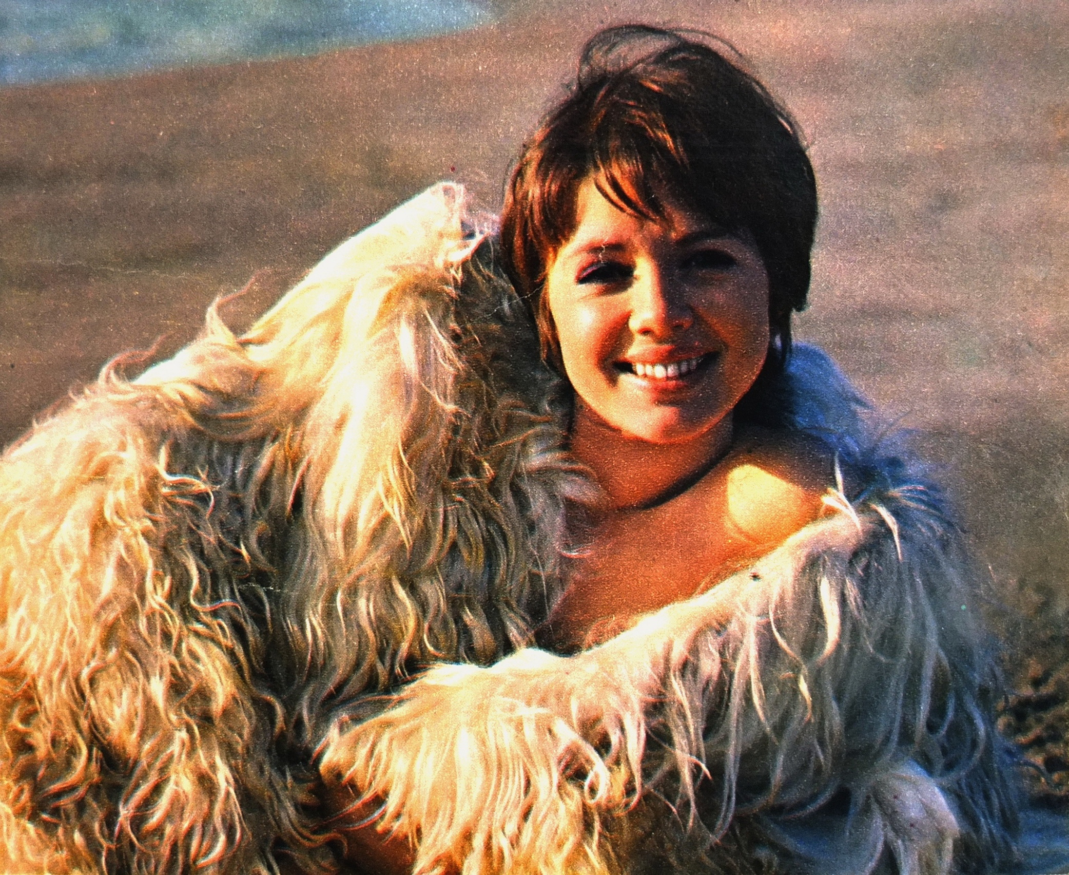 actress Haydée Politoff, Rome, 1970